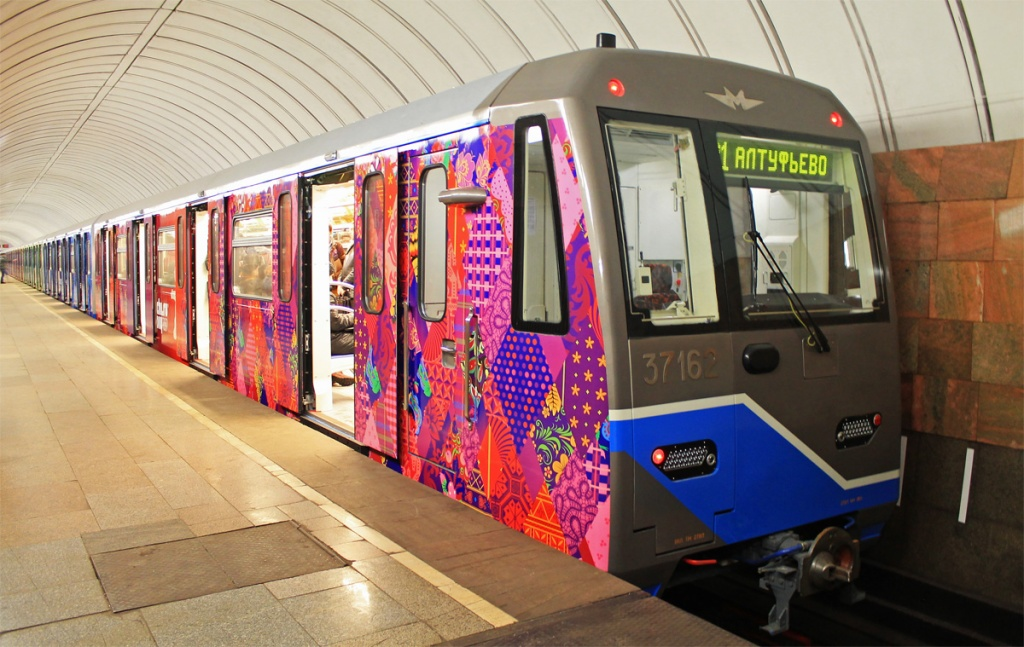 Электропоезд 81-760 в оформлении Сочи 2014